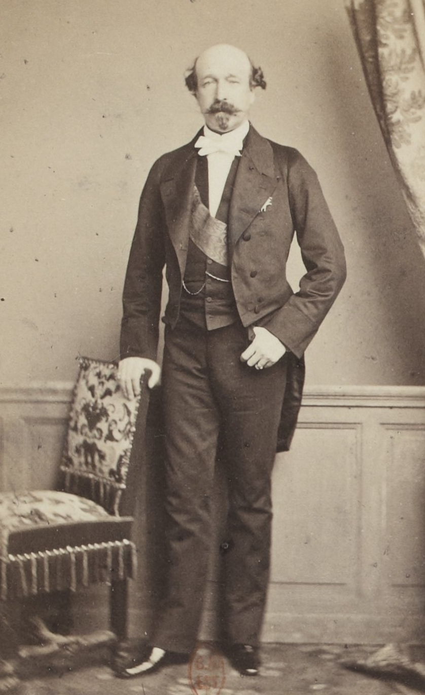 Album des députés au Corps législatif entre 1852-1857.